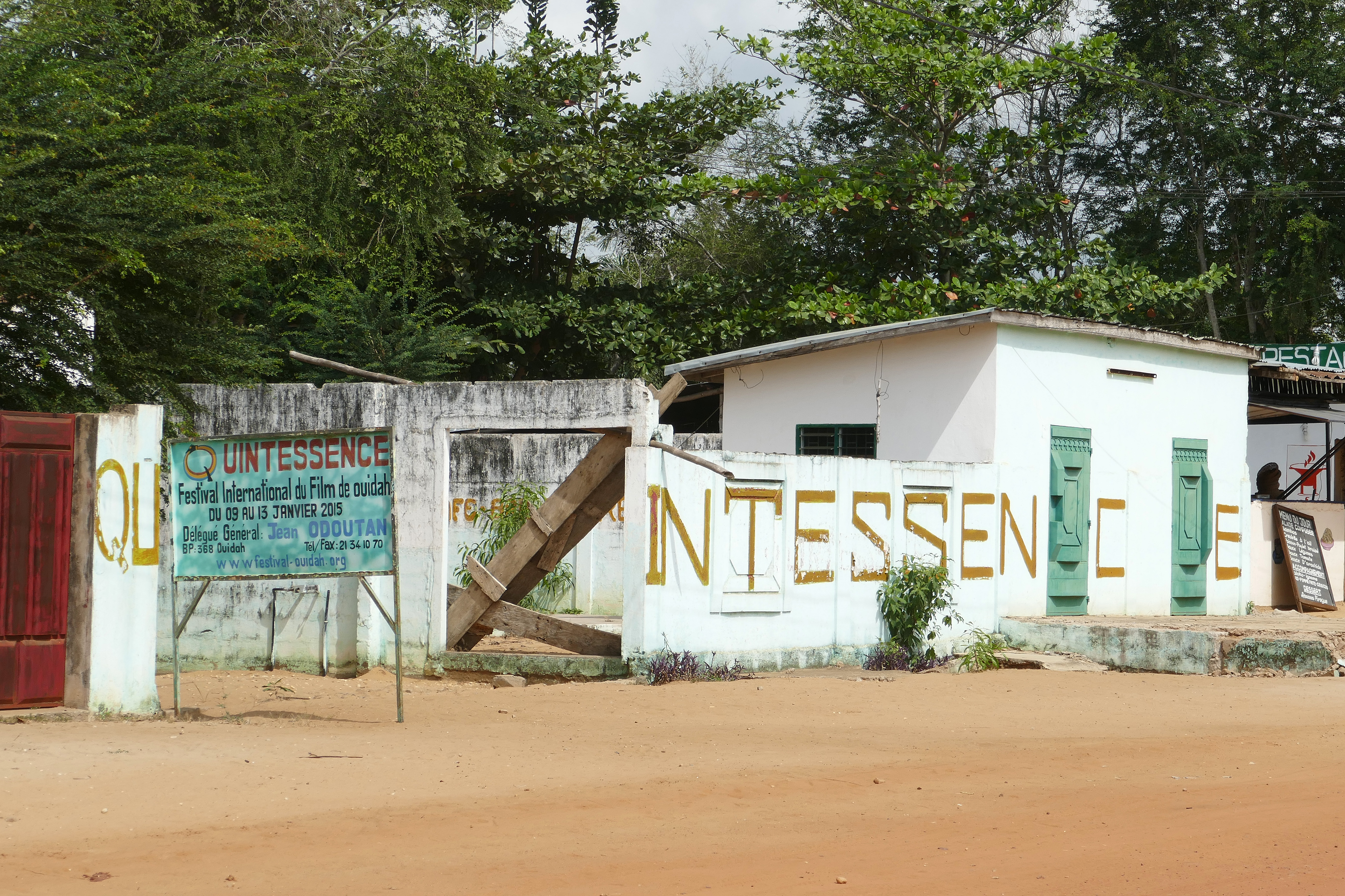 Ouidah (Bénin) : siège du Festival international du film de Ouidah (Quintessence).